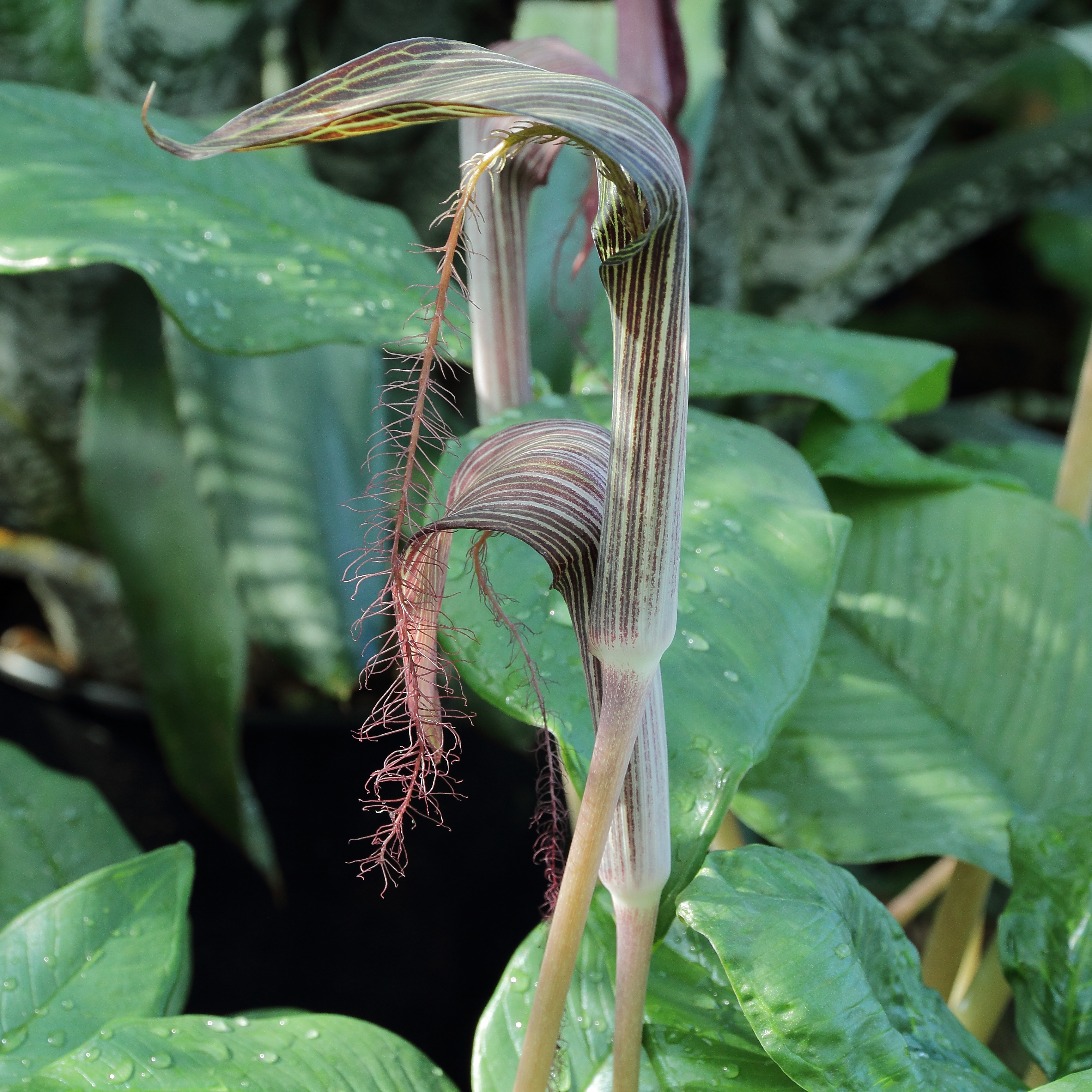 Arisaema fimbriatum i Bergianska trädgården